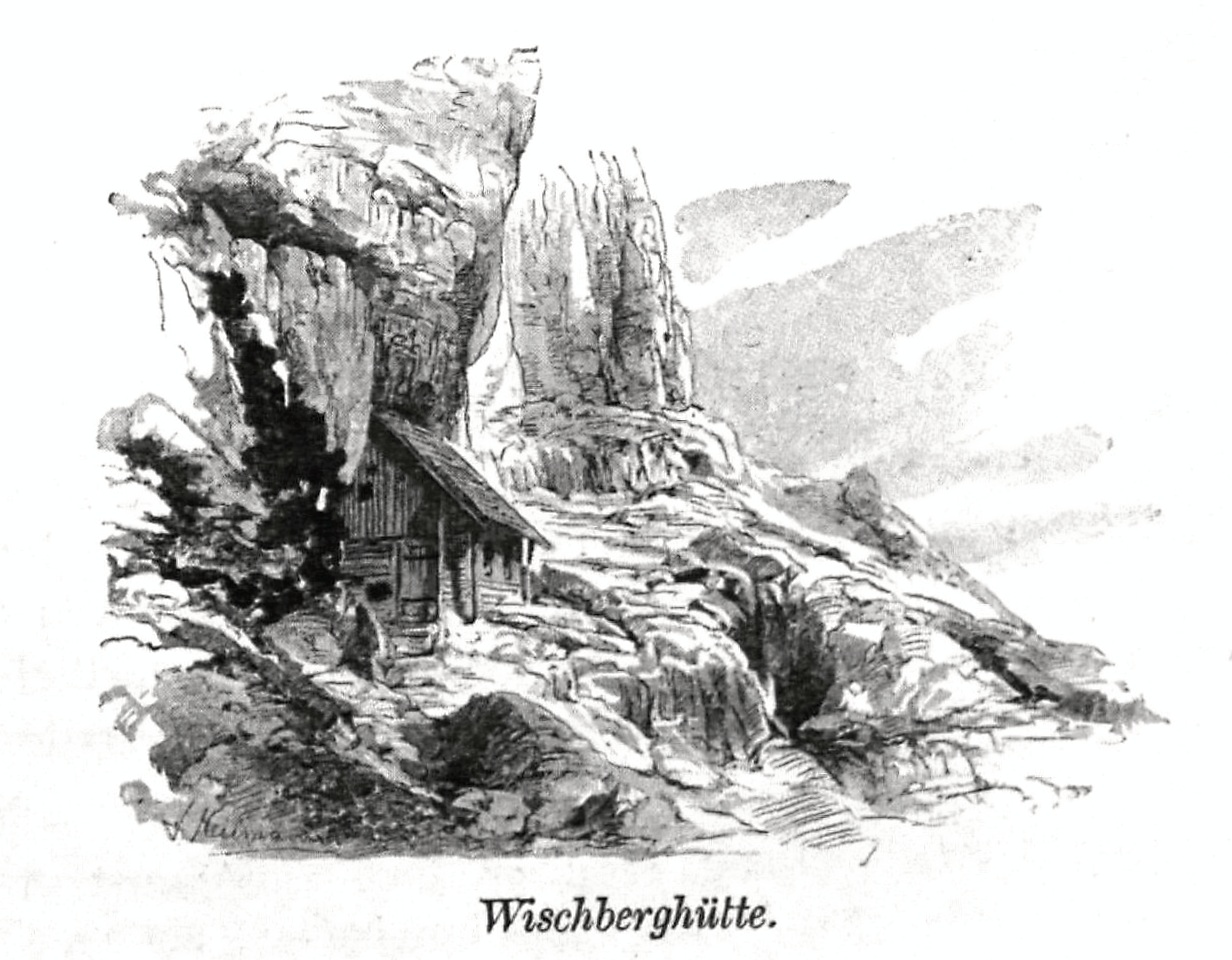 Wischberghütte aus Zeitschrift des Deutschen und Oesterreichischen Alpenvereins 1894 Band 25